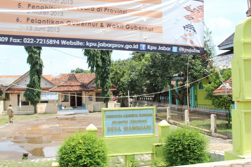 Kantor Desa Manggari Kecamatan Lebakwangi Kabupaten Kuningan Jawa Barat